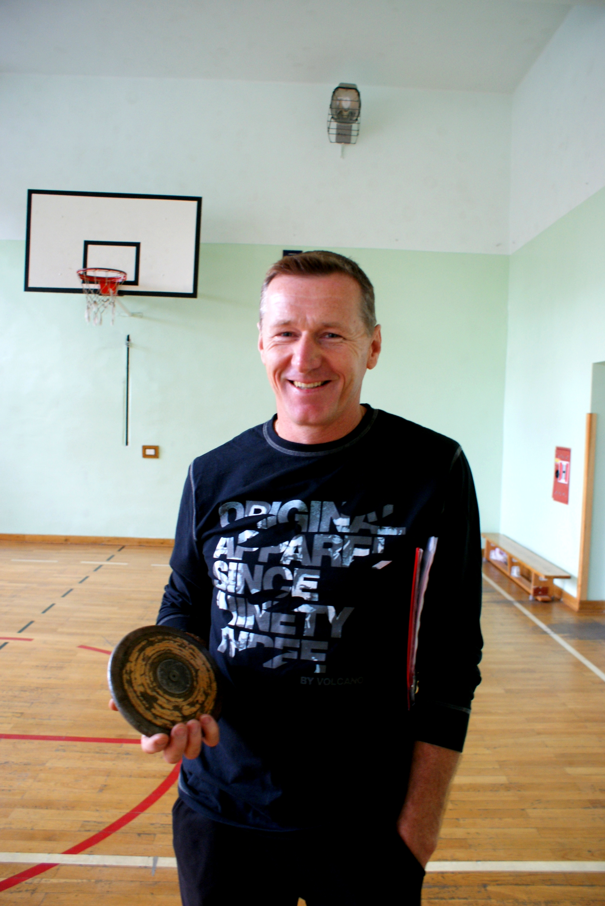 Eugeniusz Bedeniczuk - olimpijczyk, trener lekkoatletów Podlasia Białystok.